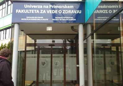 Vhod v Fakulteto za vede o zdravju